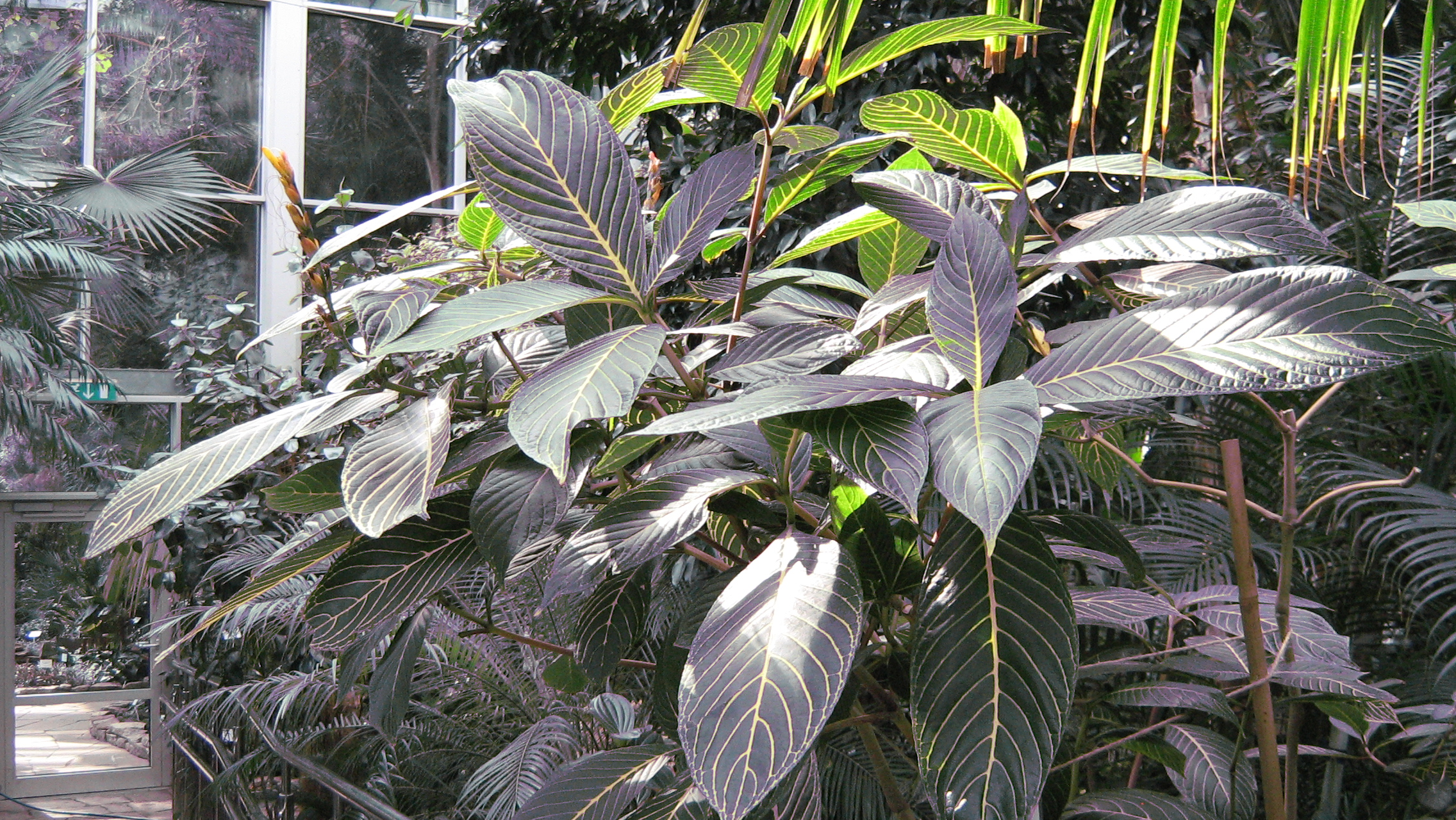 Sanchezia Szlachetna w Palmiarni Łódzkiej